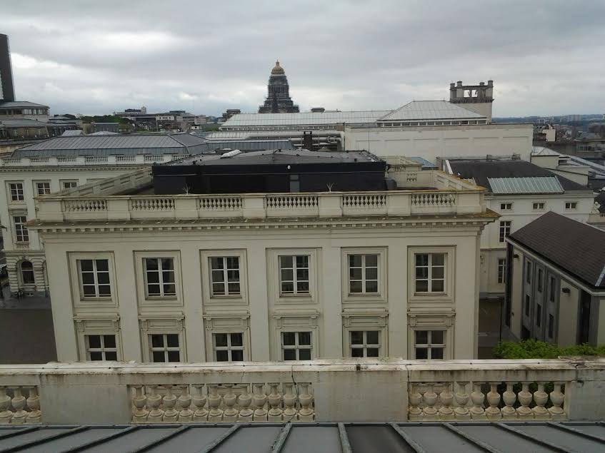 Balustrade en attique de l'Hôtel de Spangen donnant vers l'Hôtel du Lotto (actuel Musée Magritte)